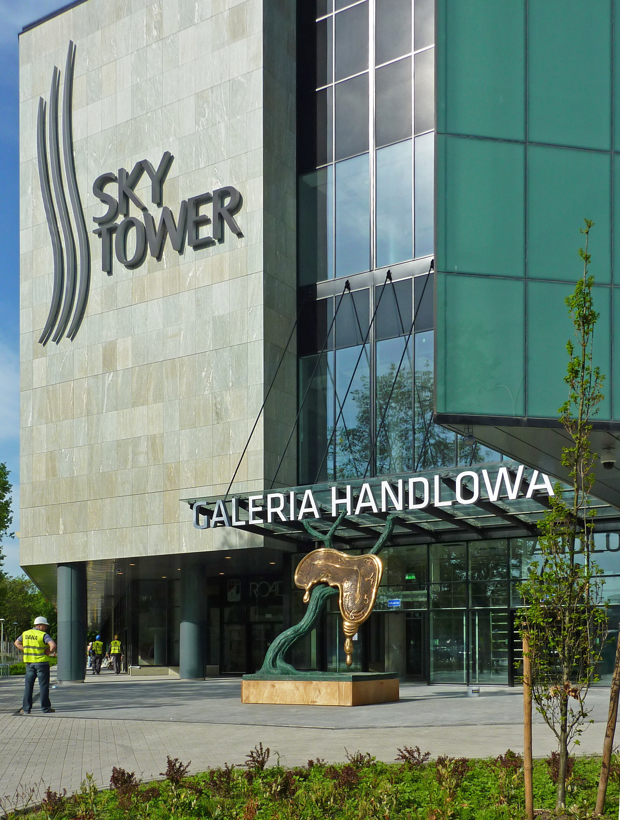 Salvador Dali: "Profil czasu". Rzeźba ustawiona przed wejściem do Sky Tower we Wrocławiu na rogu ul. Powstańców Śląskich i Szczęśliwej